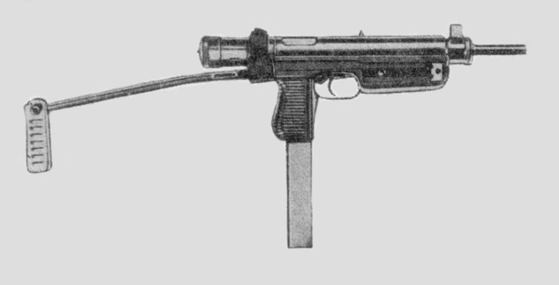 samopal 25 ... submachine gun 25 (samopal vzor 48 ... submachine gun model year 1948 para)